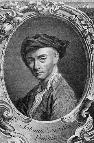 Frontispice du "prospectus", montrant Canaletto et son graveur Visentini